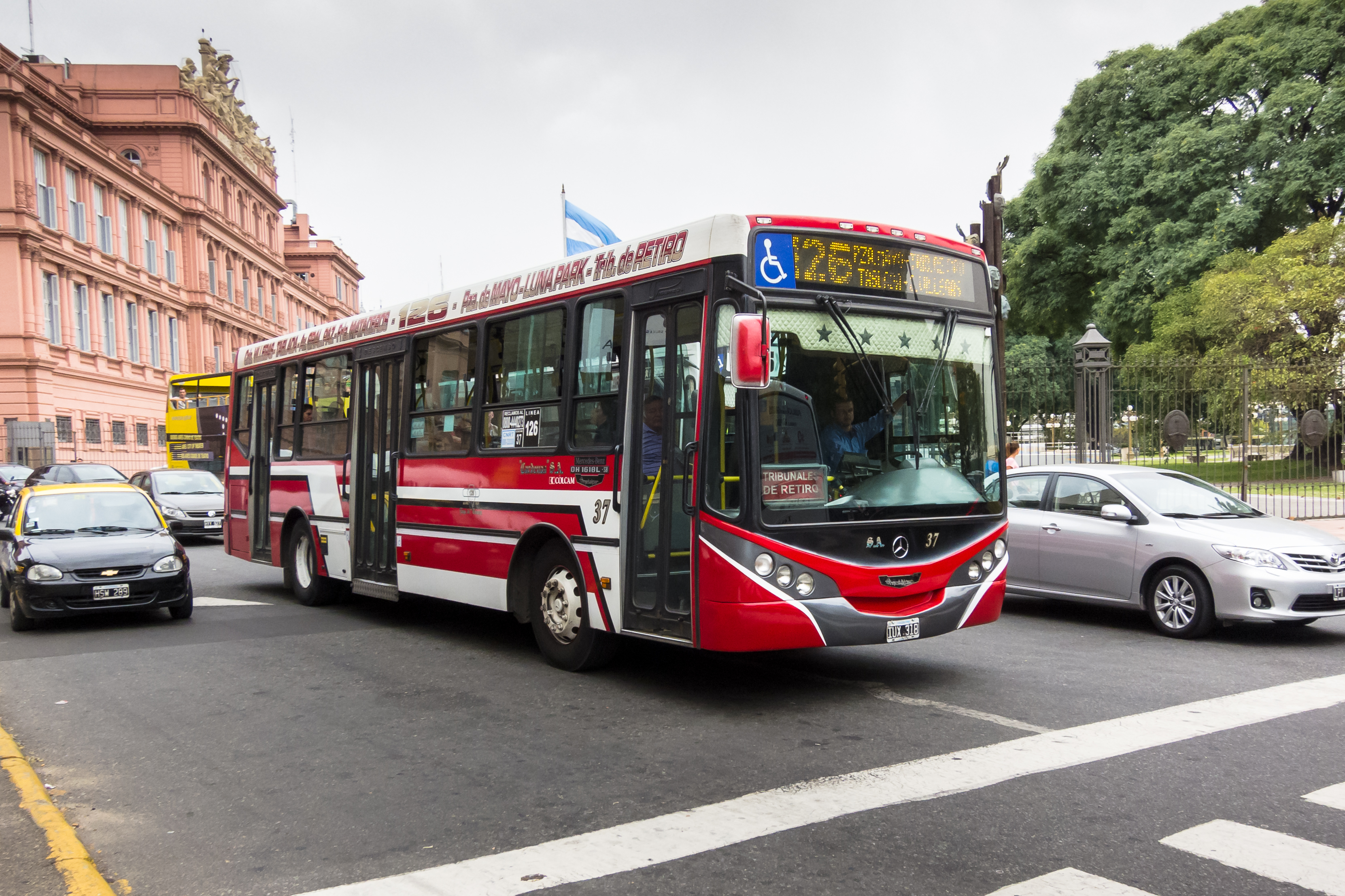 Colectivo de la Línea 126, interno 37, carrocería Metalpar Iguazú, chasis Mercedez-Benz OH 1618L-SB, matrícula IUX318. Buenos Aires, Argentina.